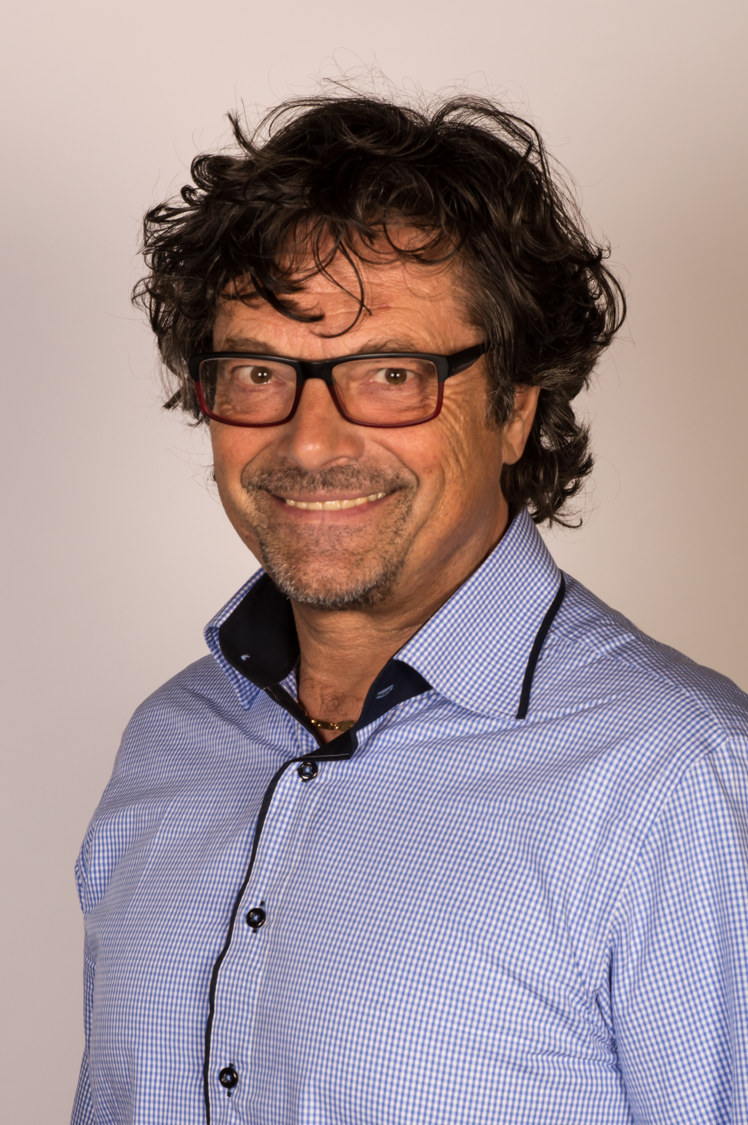 Bundesparteitag DIE LINKE Mai 2014 in Berlin, Velodrom, Mitglied des Parteivorstandes 2014 - 2016